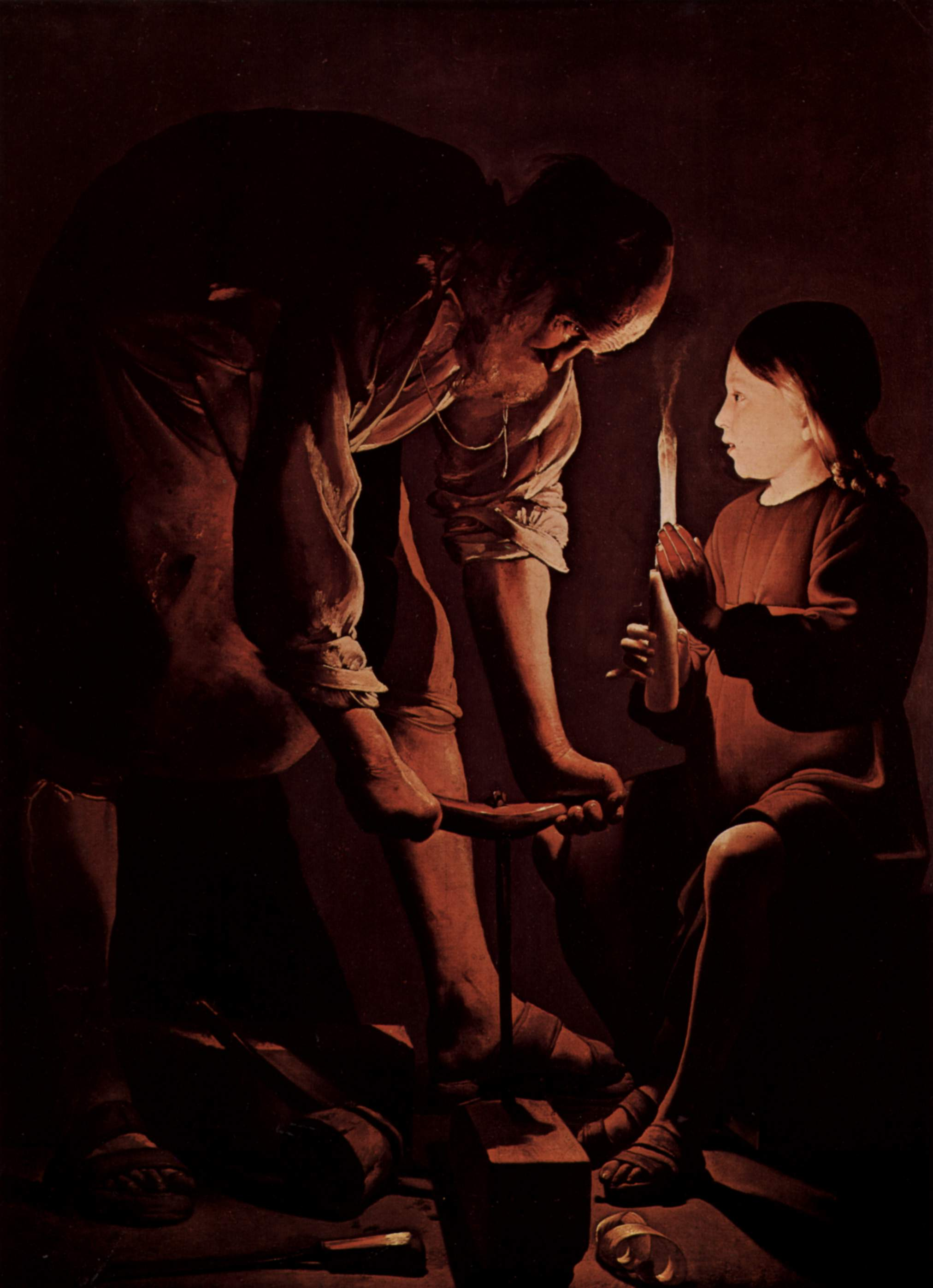 Saint Joseph, patron des charpentiers, travaille une poutre devant l'Enfant Jésus qui semble déjà y voir le bois de sa croix.